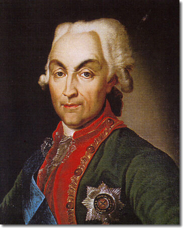 Nikolai Vasilyevich Repnin